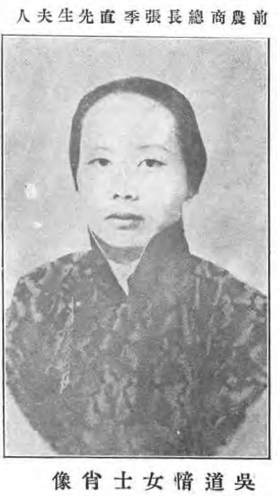 治家全書圖像